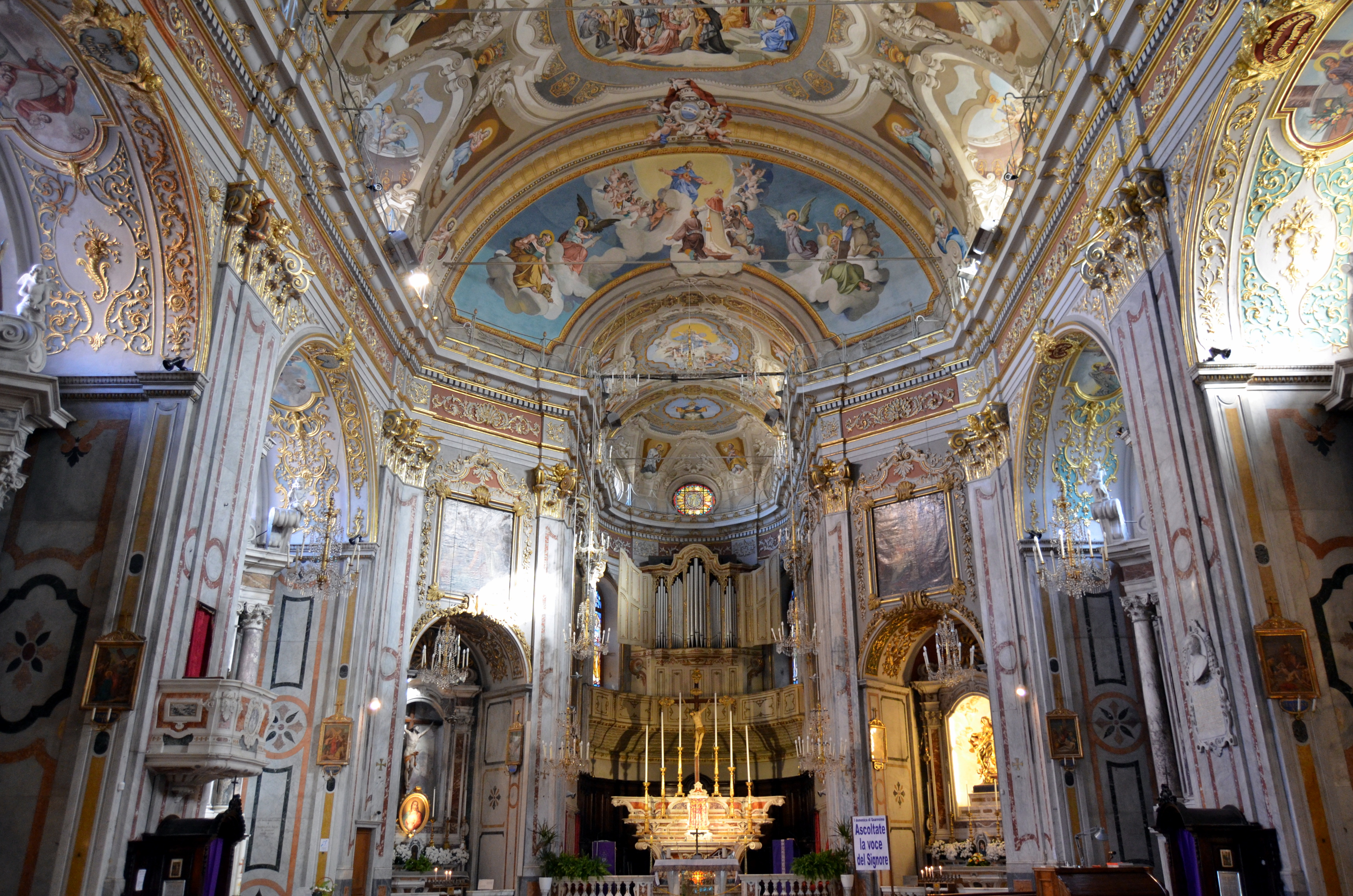 Navata centrale della chiesa di Santa Margherita, Sori, Liguria, Italia